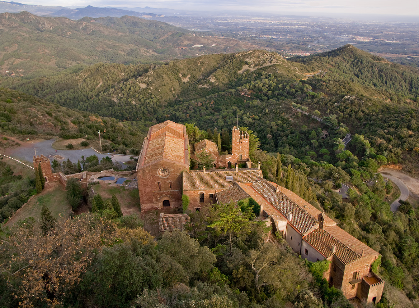 Castell monestir d'Escornalbou (Riudecanyes)